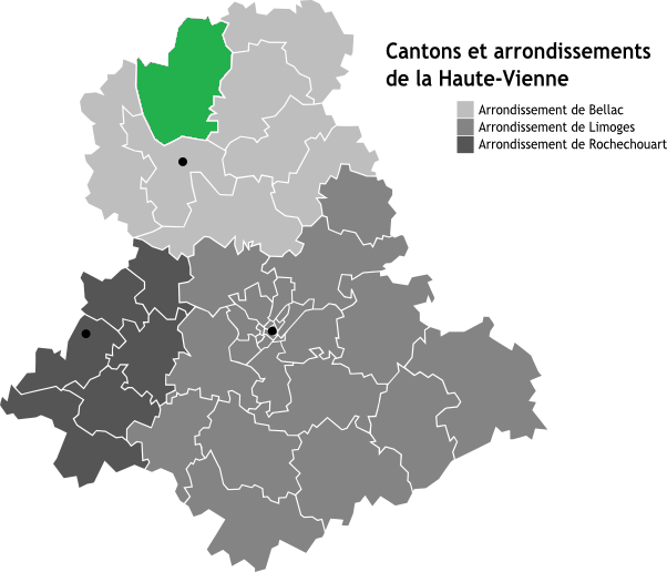 Canton du Dorat, Limousin, France en Carte des arrondissements de la Haute-Vienne